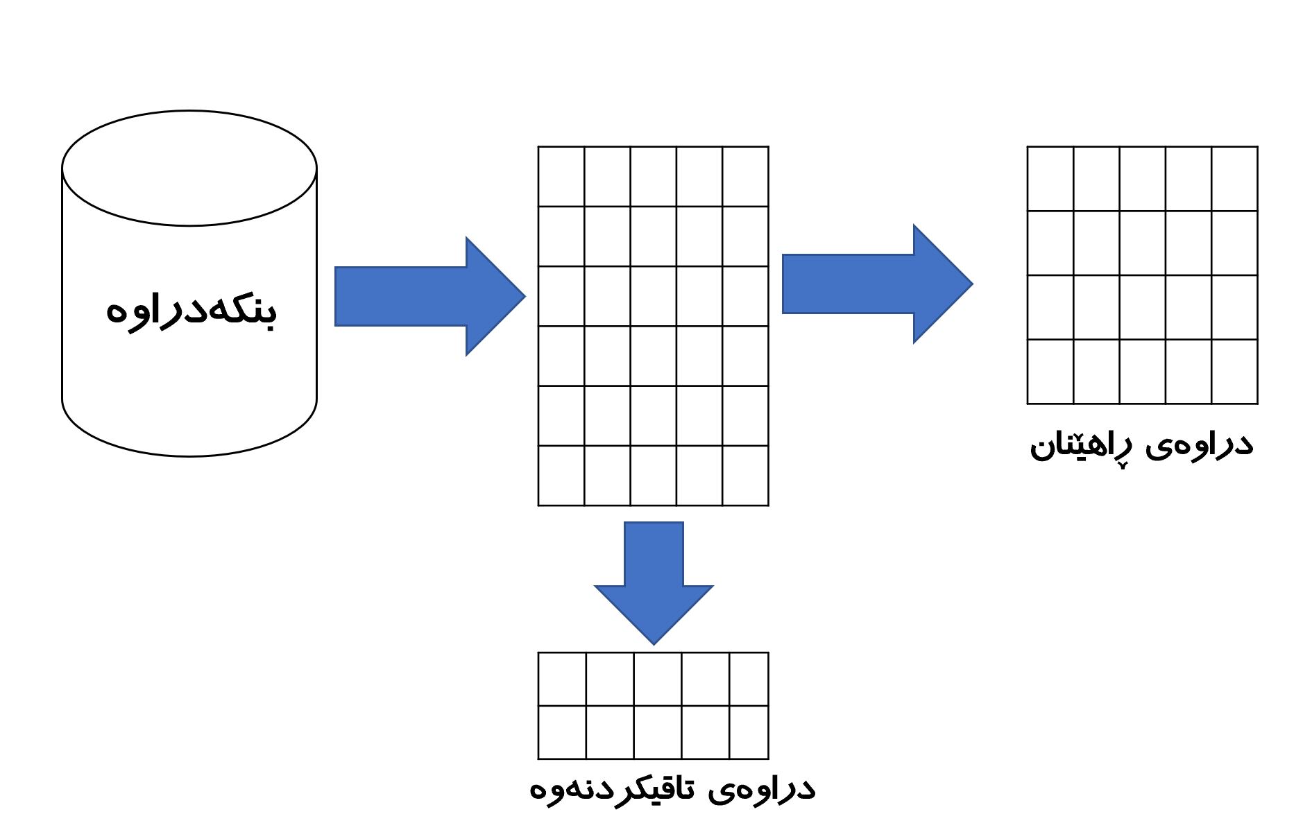 کوردی: دراوەکە پێویستە بکرێت بە دوو بەشەوە: دراوەی ڕاھێنان و تاقیکردنەوە